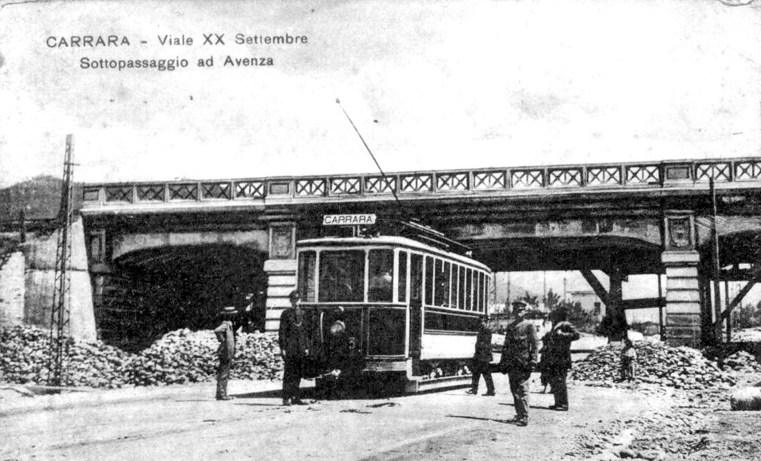 Sottovia ferroviario di Carrara - Cartolina d'epoca